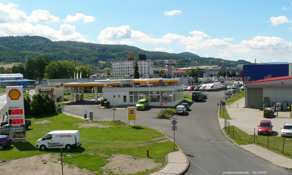 Pohled z Nového mostu na Rozbělesy.